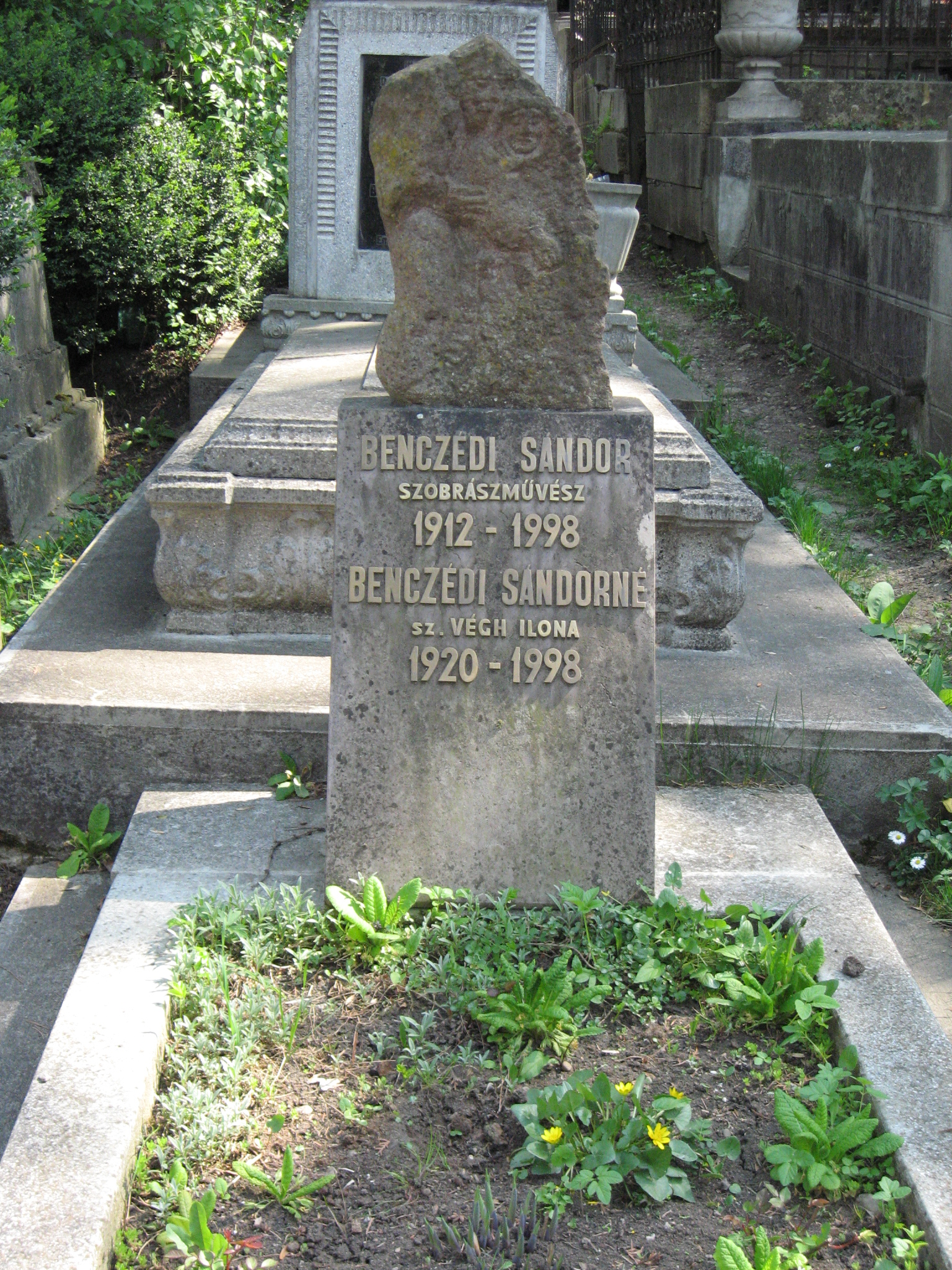 Benczédi Sándor, id. sírja a kolozsvári Házsongárdi temetőben.